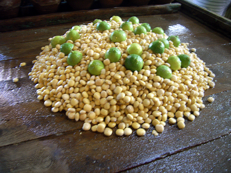 Lupinensamen